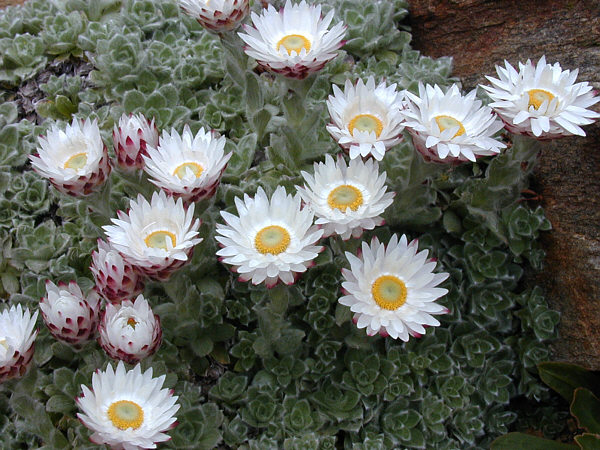 Plante en tapis des Mts Dragensberg au dessus de 2800m sur éboulis et zone graveleuse. Fleur de 2,5cm haute de 5cm. (photo en culture)